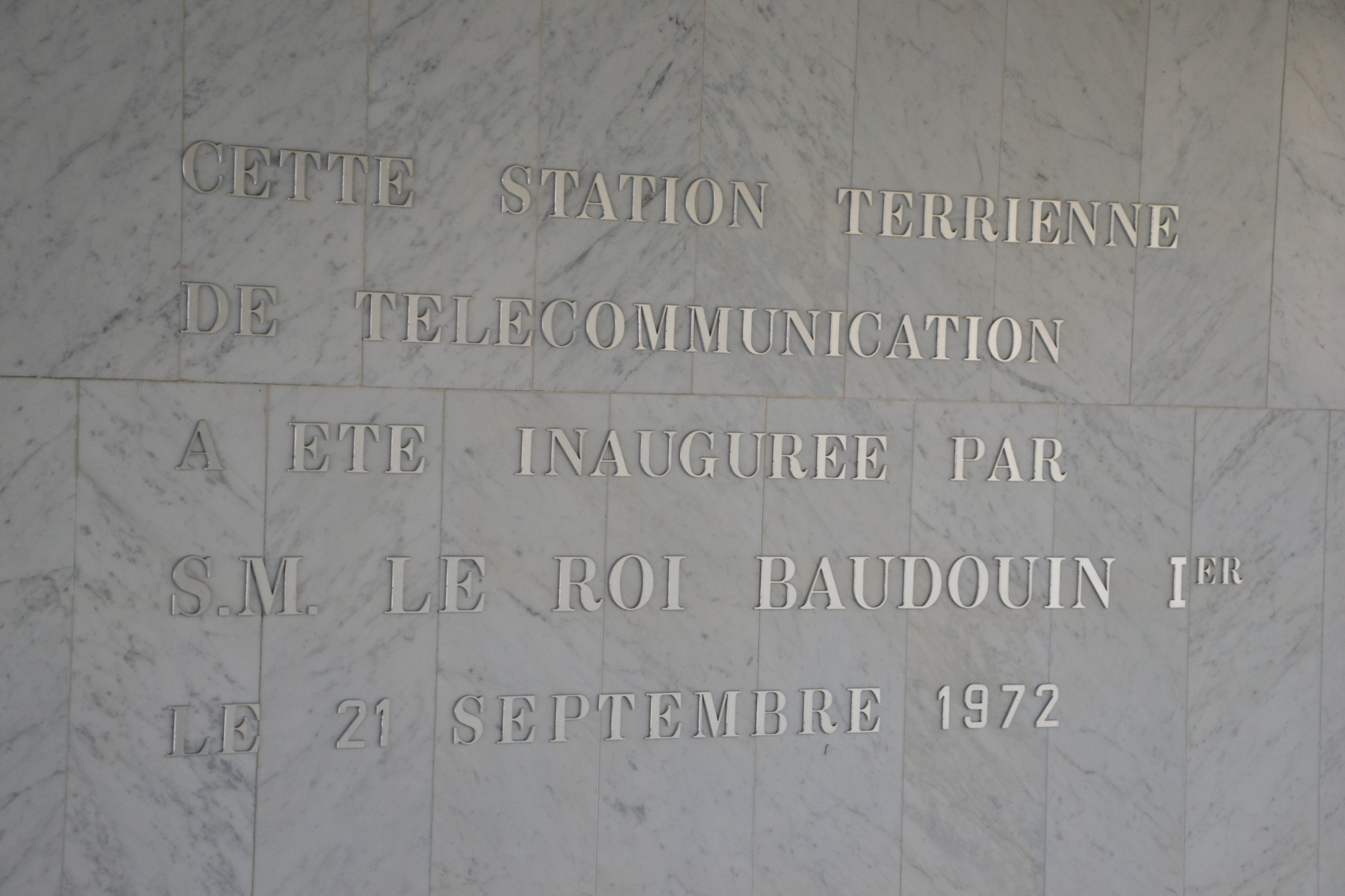 Stèle d'inauguration de la station terrienne de télécommunication par SM Le Roi Baudouin Ier